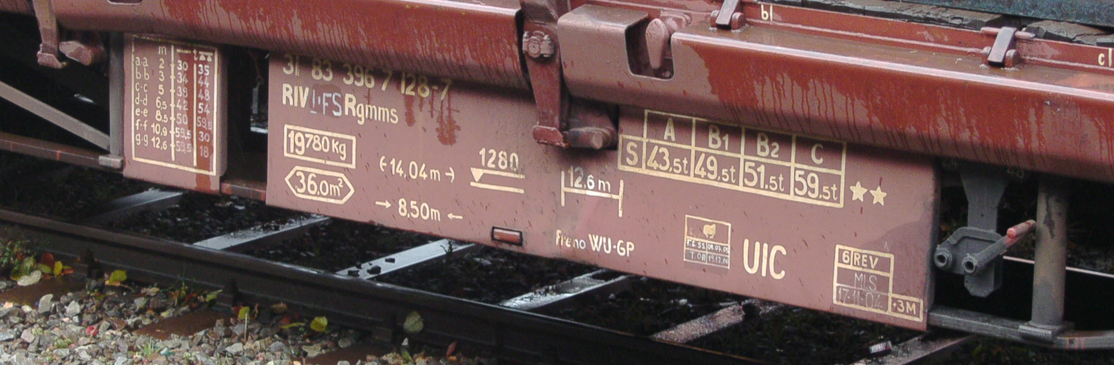 Anschriftenfeld eines vierachsigen Flachwagens der Regelbauart, Gattung Rgmms, Eigentümer: Trenitalia